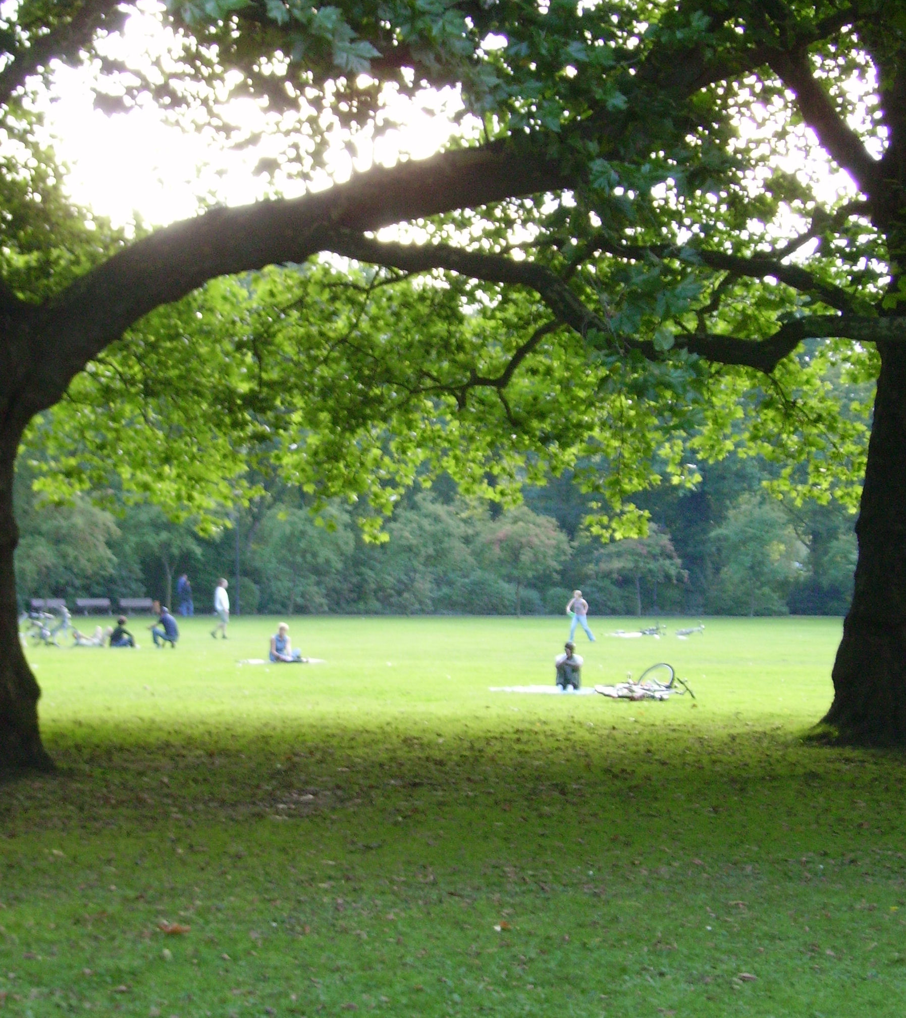 Volkspark of Kaiserslautern in Rheinland-Pfalz (Germany)